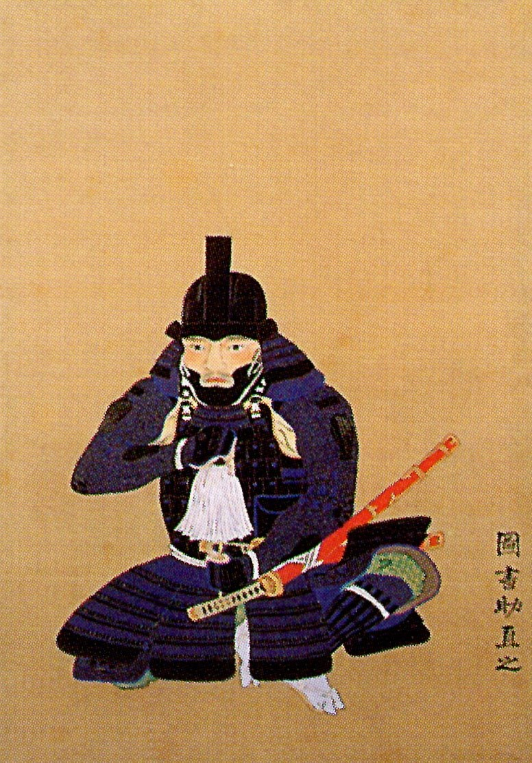 黒田直之の肖像。